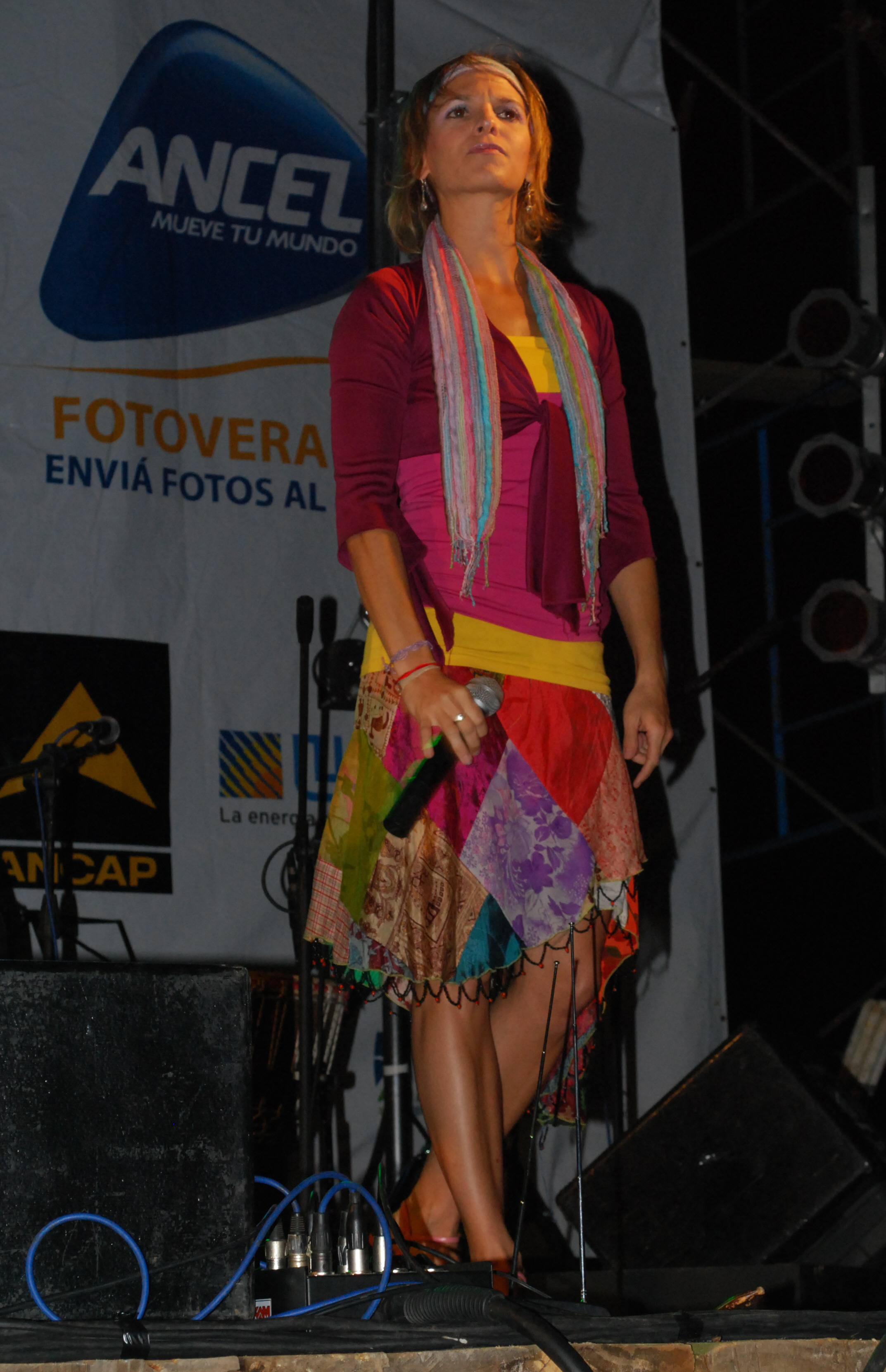 Fotografía de la compositora, guitarrista y cantante de música popular uruguaya Erika Büsch, en un concierto brindado en Atlántida (Departamento de Canelones) - Uruguay, en el cual también actuaron Heber y La Tocata, Mauricio Ubal y la murga Agarrate Catalina.